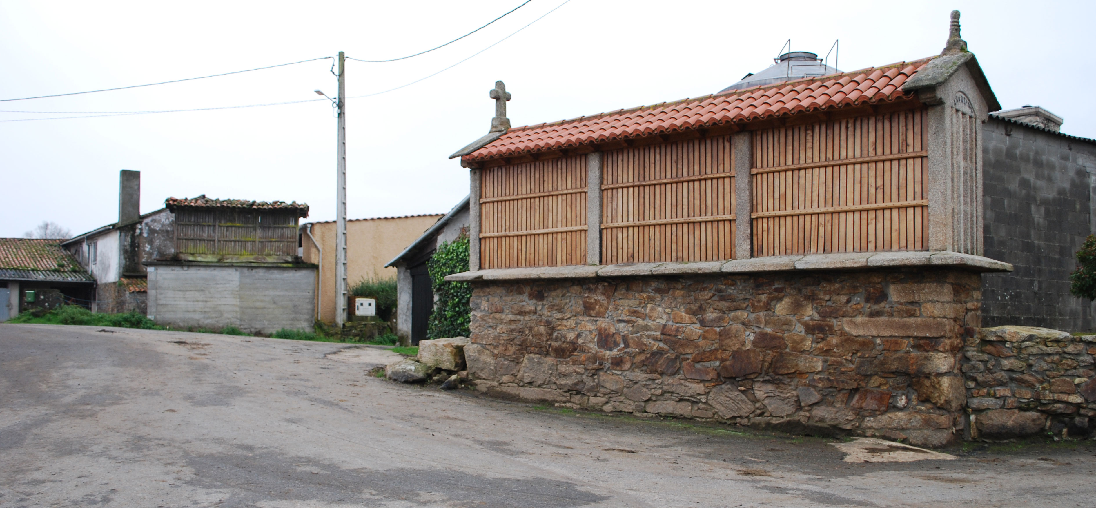 Hórreo das Merelas Fisteus Curtis A Coruña Galiza Spain